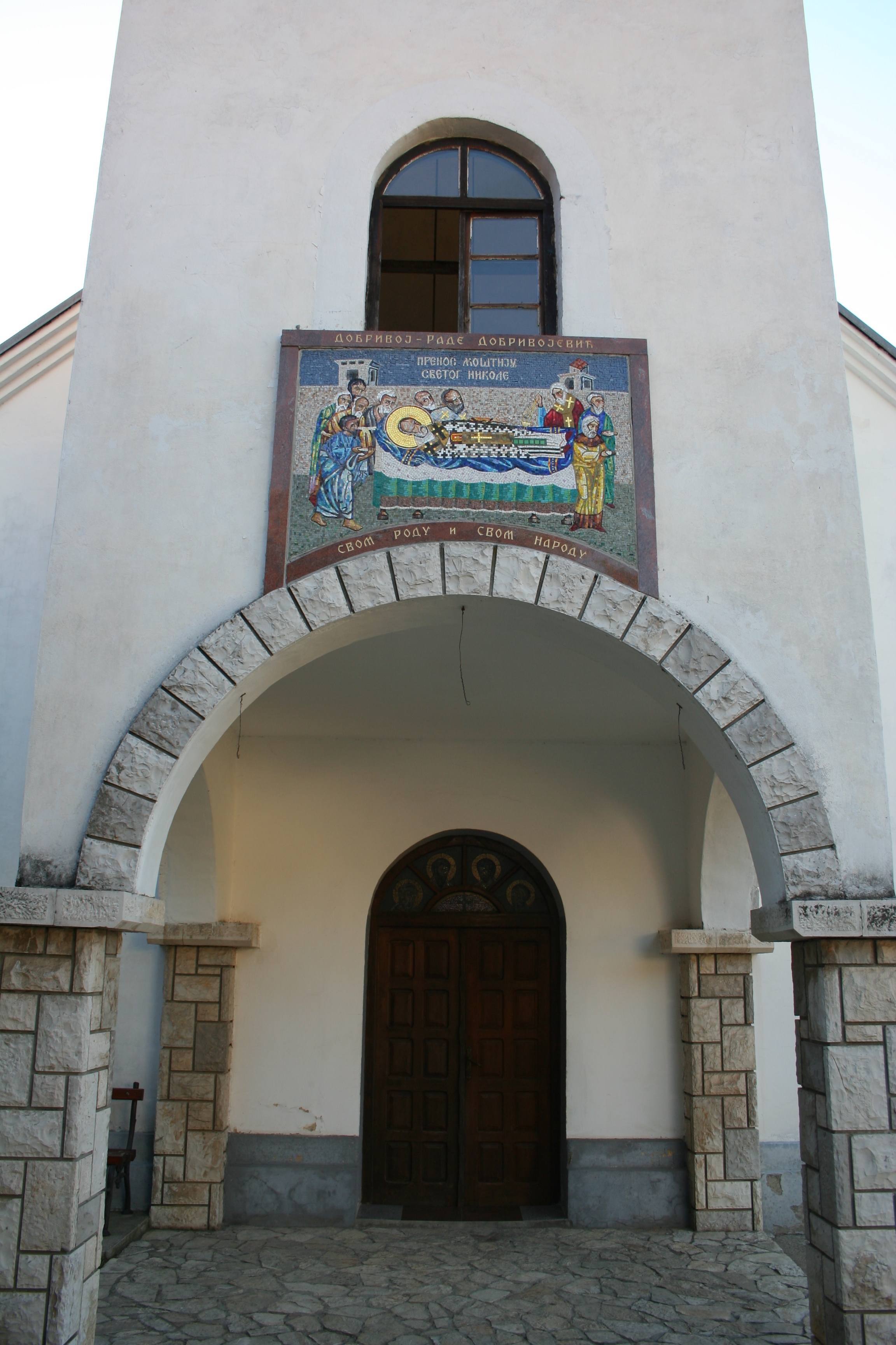 Crkva prenosa moštiju Sv. Nikolaja, Stepanje